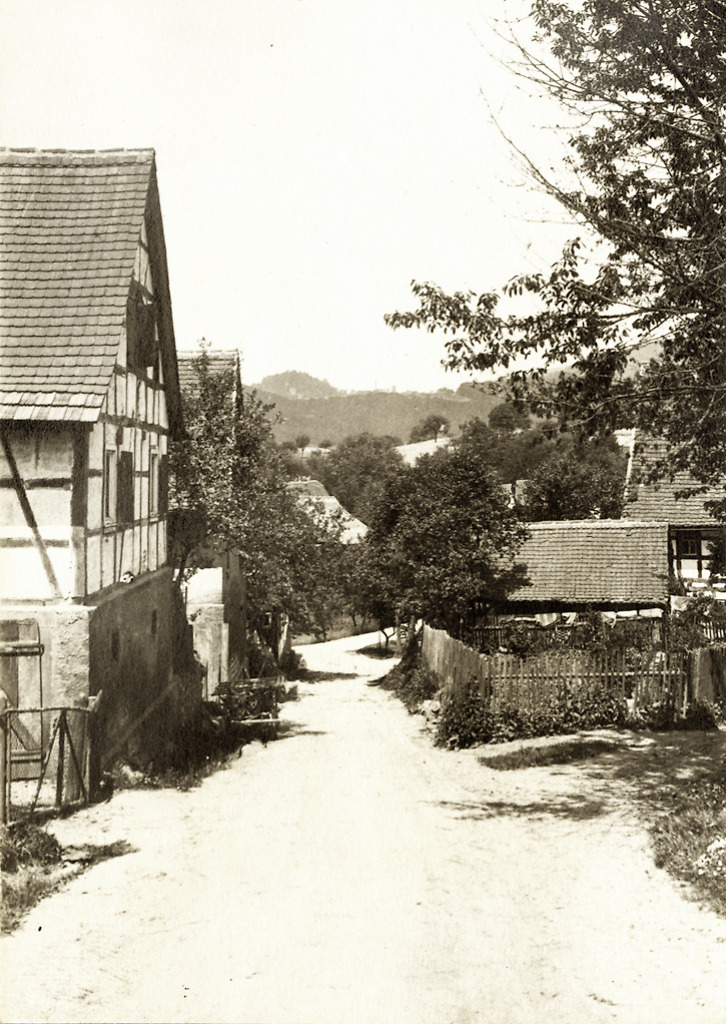 Dorfstraße in Krumbach im Odenwald, 1908. Heute Fürth im Odenwald, Ortsteil Krumbach